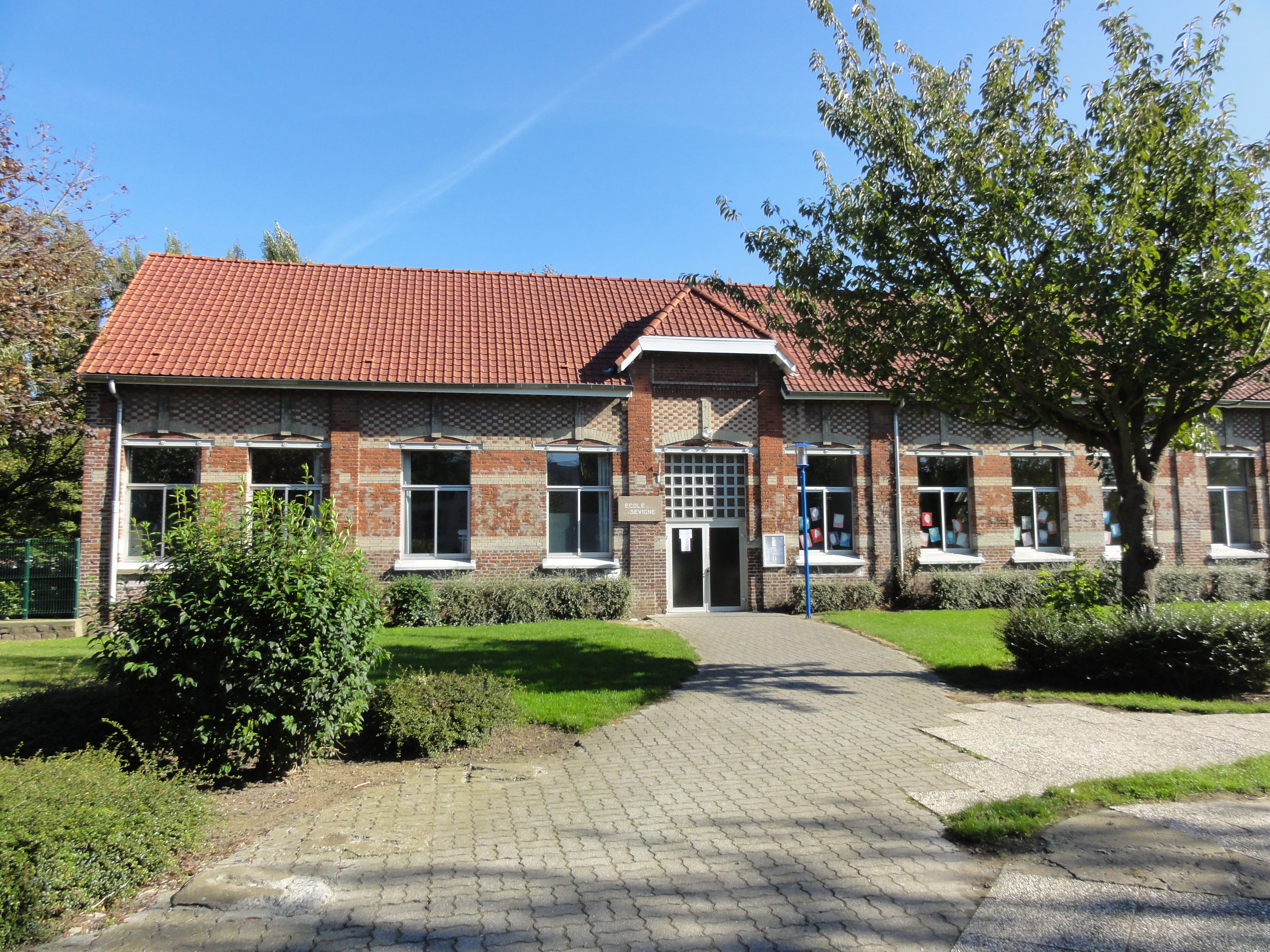 Écoles des cités de la fosse n° 10 - 20 de la Compagnie des mines de Courrières dans le bassin minier du Nord-Pas-de-Calais, Billy-Montigny, Pas-de-Calais, Nord-Pas-de-Calais, France.